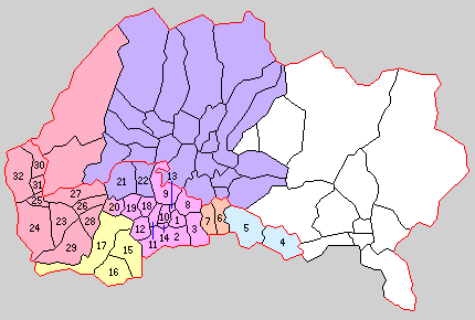 福島県河沼郡の町村。